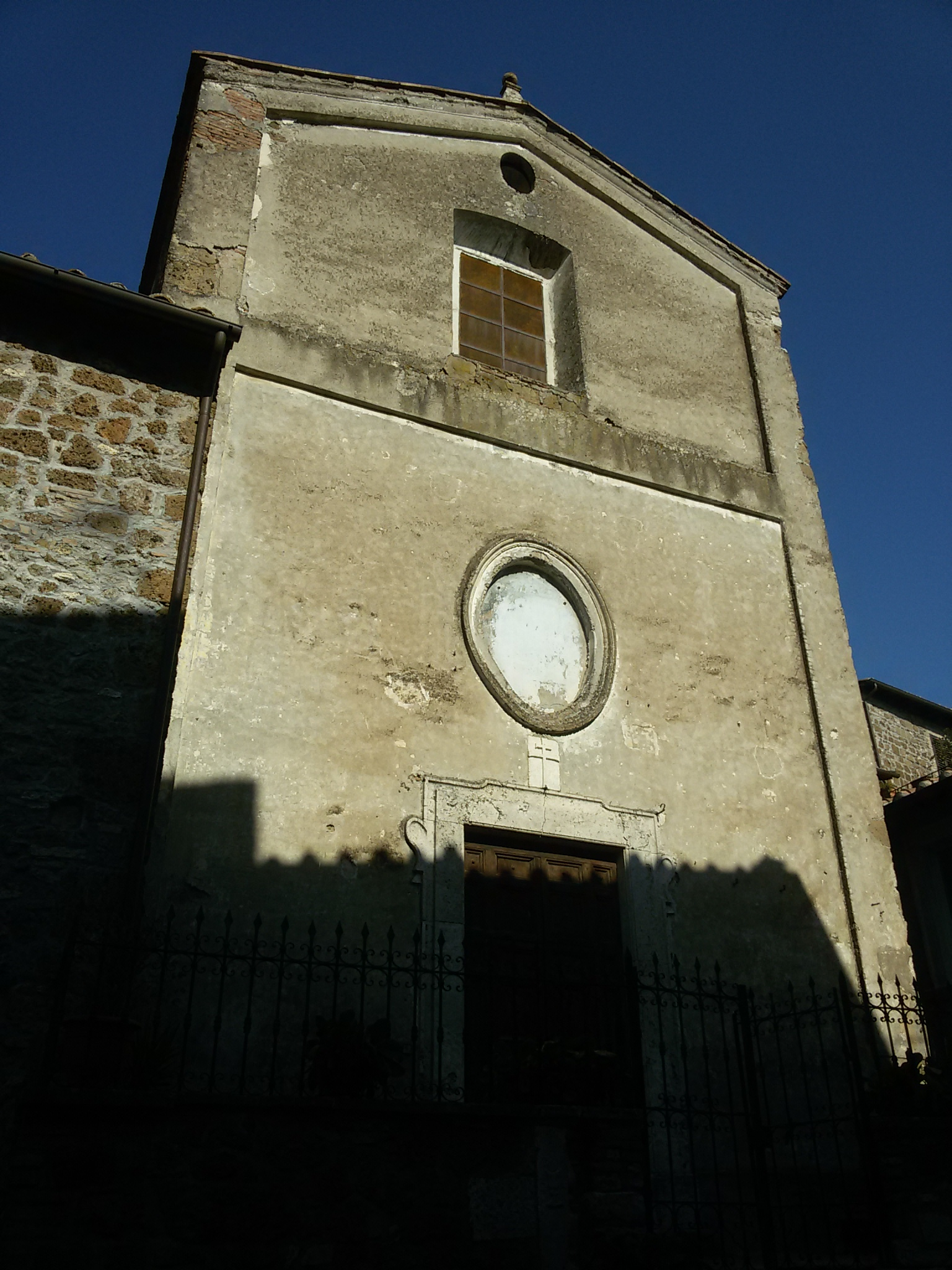 Chiesa di San Biagio, Orte (VT)